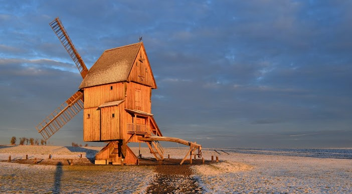 Technikdenkmal Bockwindmühle in Jena-Krippendorf